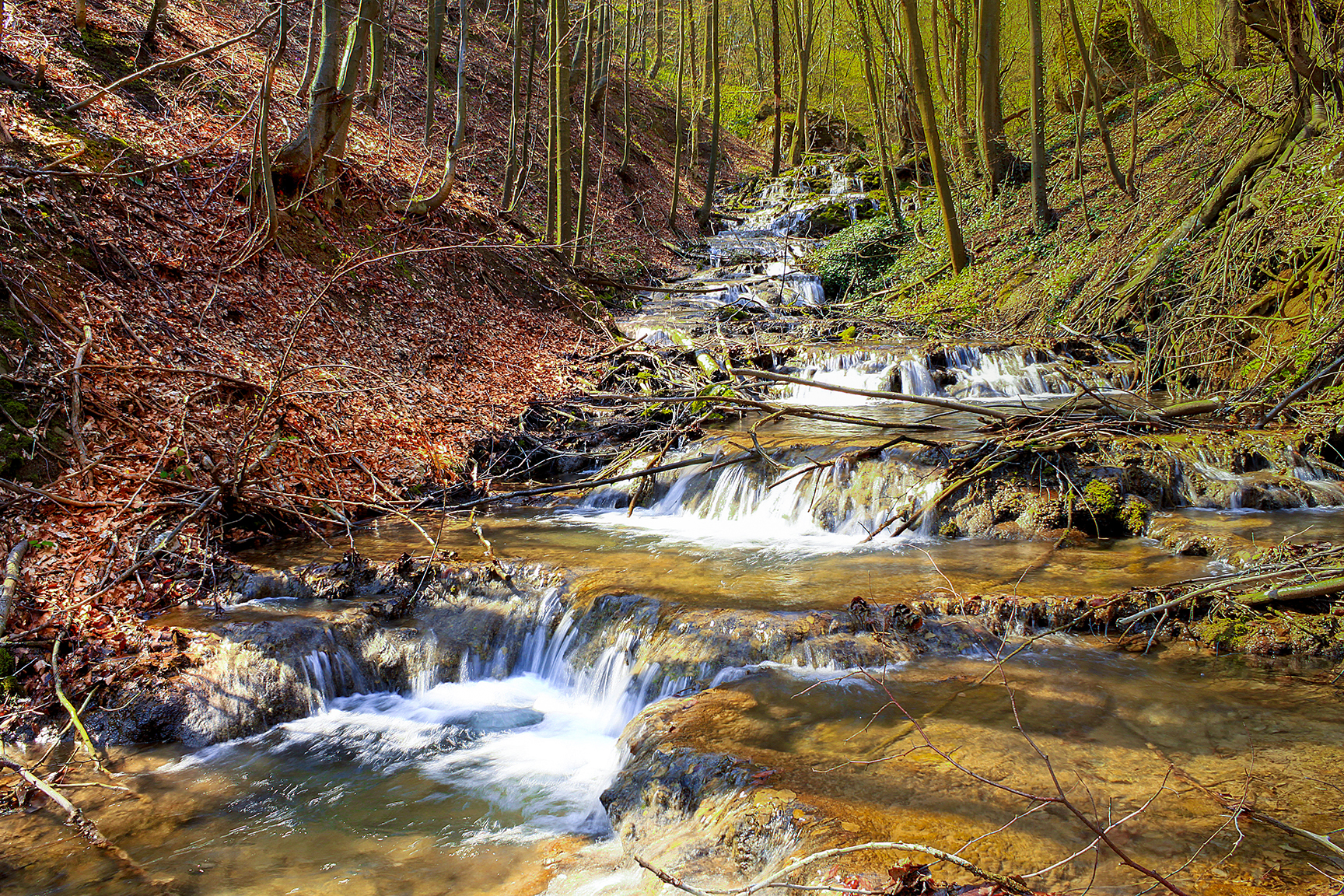 Српски (ћирилица): Споменик природе Бигрена акумулација Бели изворац. Бигрене каде извора Ово је фотографија заштићеног природног добра у Србији под шифром: СП270 This is a a photo of a natural area in Serbia with ID: СП270